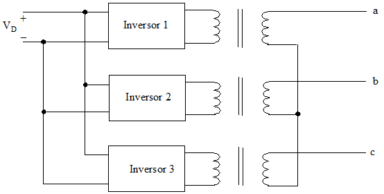 Inversor trifásico implementado como tres inversores monofásicos. • Este montaje requiere de 12 interruptores, con sus 12 diodos en anti paralelo asociados a éstos. Además, si las salidas de los tres inversores monofásicos no se encuentran perfectamente equilibradas en magnitud y en fase, las tensiones que alimentan a la carga se encontrarán desequilibradas. • Requiere el uso de 12 transistores de potencia.